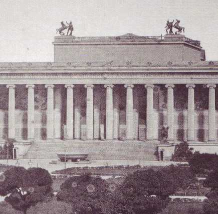 Altes Museum mit Granitschale vor 1854